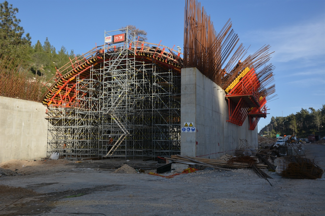 המעבר האקולוגי שהעבודות עליו התחדשו, כמו גם העבודות על קטע שער הגיא-שורש כולו.